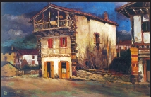 “Ilehoriaren etxea”, 1926, R. Baroja.